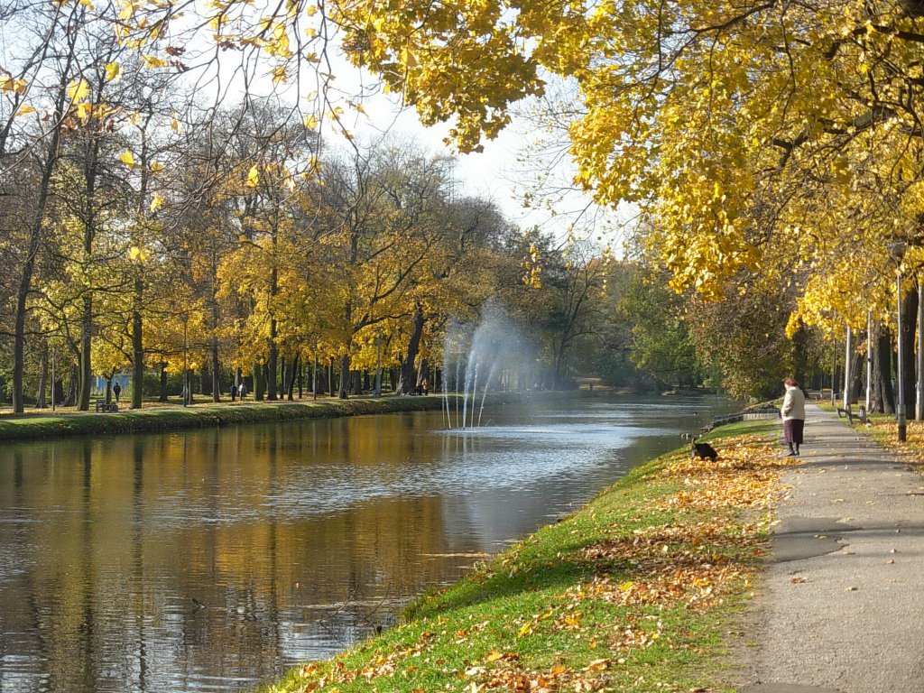 Planty nad Kanałem Bydgoskim